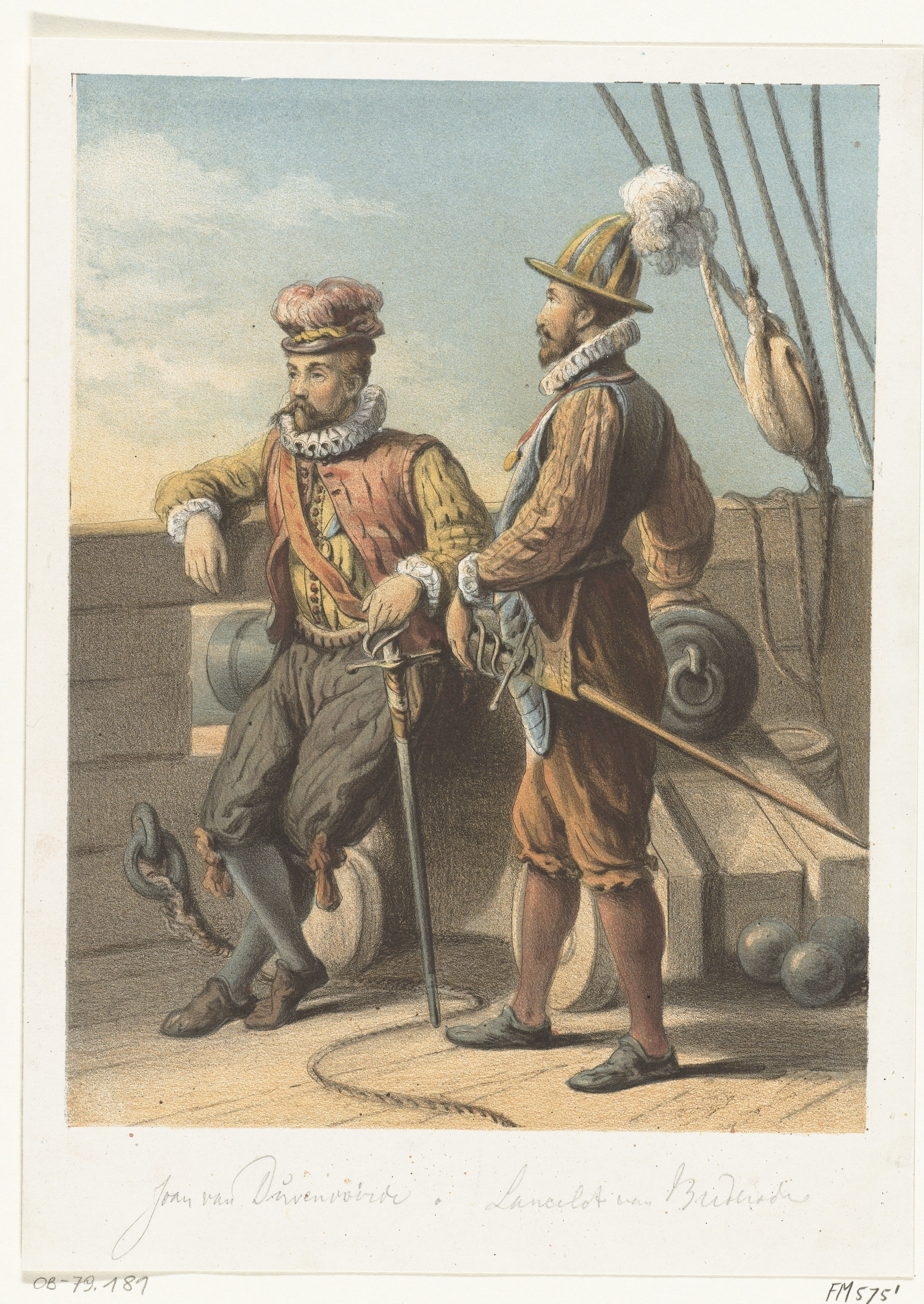 IdentificatieTitel(s): Portretten van de watergeuzen Jan van Duivenvoorde en Lancelot van Brederode, 1572Objecttype: prent historieprent Objectnummer: RP-P-OB-79.181Catalogusreferentie: FMH 575Omschrijving: Portretten van de watergeuzen Jan van Duivenvoorde en Lancelot van Brederode, op het dek van een schip bij een kanon, 1572.VervaardigingVervaardiger: prentmaker: anoniemnaar tekening van: Johannes Hilverdinkdrukker: Emrik & BingerPlaats vervaardiging: NederlandDatering: 1825 - 1899Fysieke kenmerken: chromolithografieMateriaal: papier Techniek: chromolithografieAfmetingen: blad: h 278 mm × b 202 mmToelichtingStaat vóór de letter.OnderwerpWat: de soldaat; het leven van een soldaatWanneer: 1572 - 1572Wie: Johan van DuvenvoordeLancelot van BrederodeVerwerving en rechtenVerwerving: aankoop 1881Copyright: Publiek domein